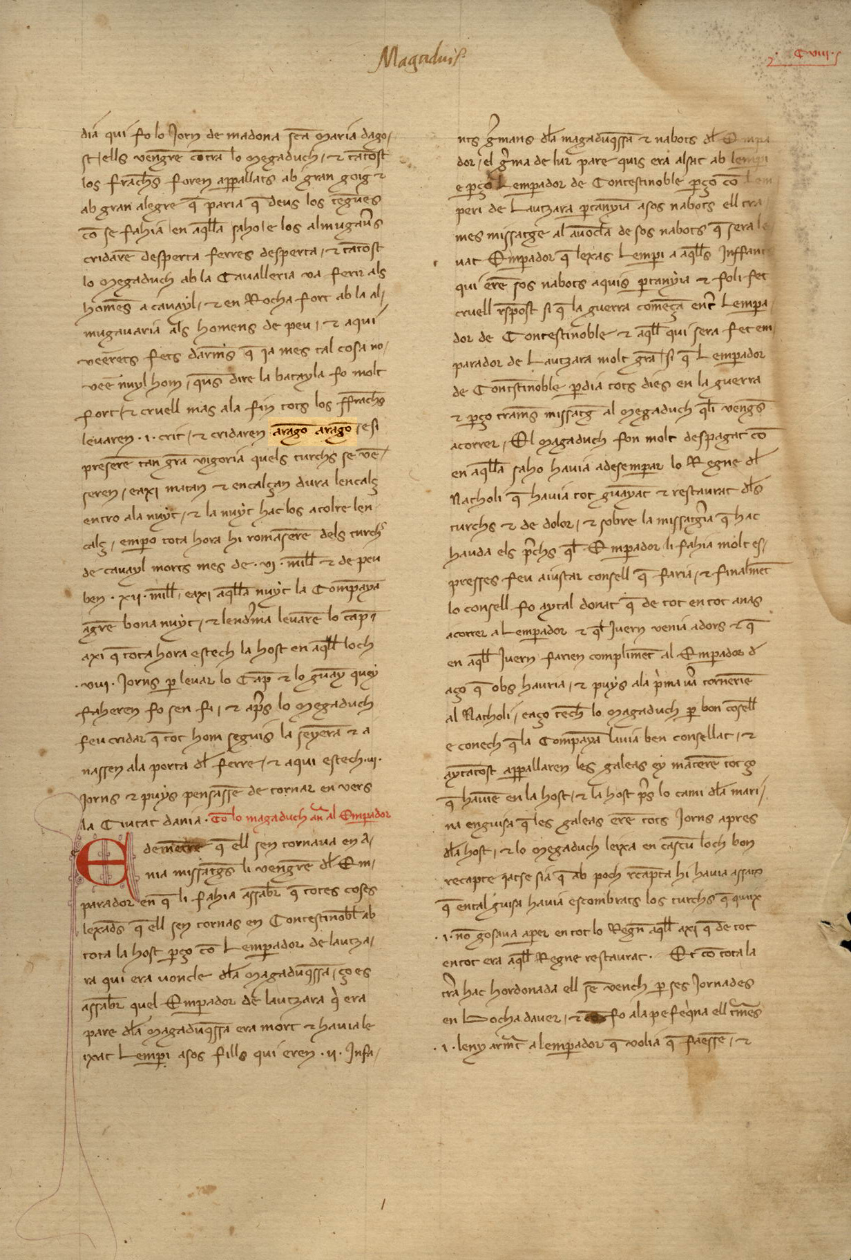 "Aragon, Aragon", grito de guerra de los almogávares en la Crónica de Ramon Muntaner, 1325, f. 114r (Nota la tilde del manuscrito original sobre estas palabras indica una "n" final, del mismo modo que ffrachs con tilde representa ffranchs (francos), denominación utilizada para los miembros de la Gran Compañía de los Almogávares).